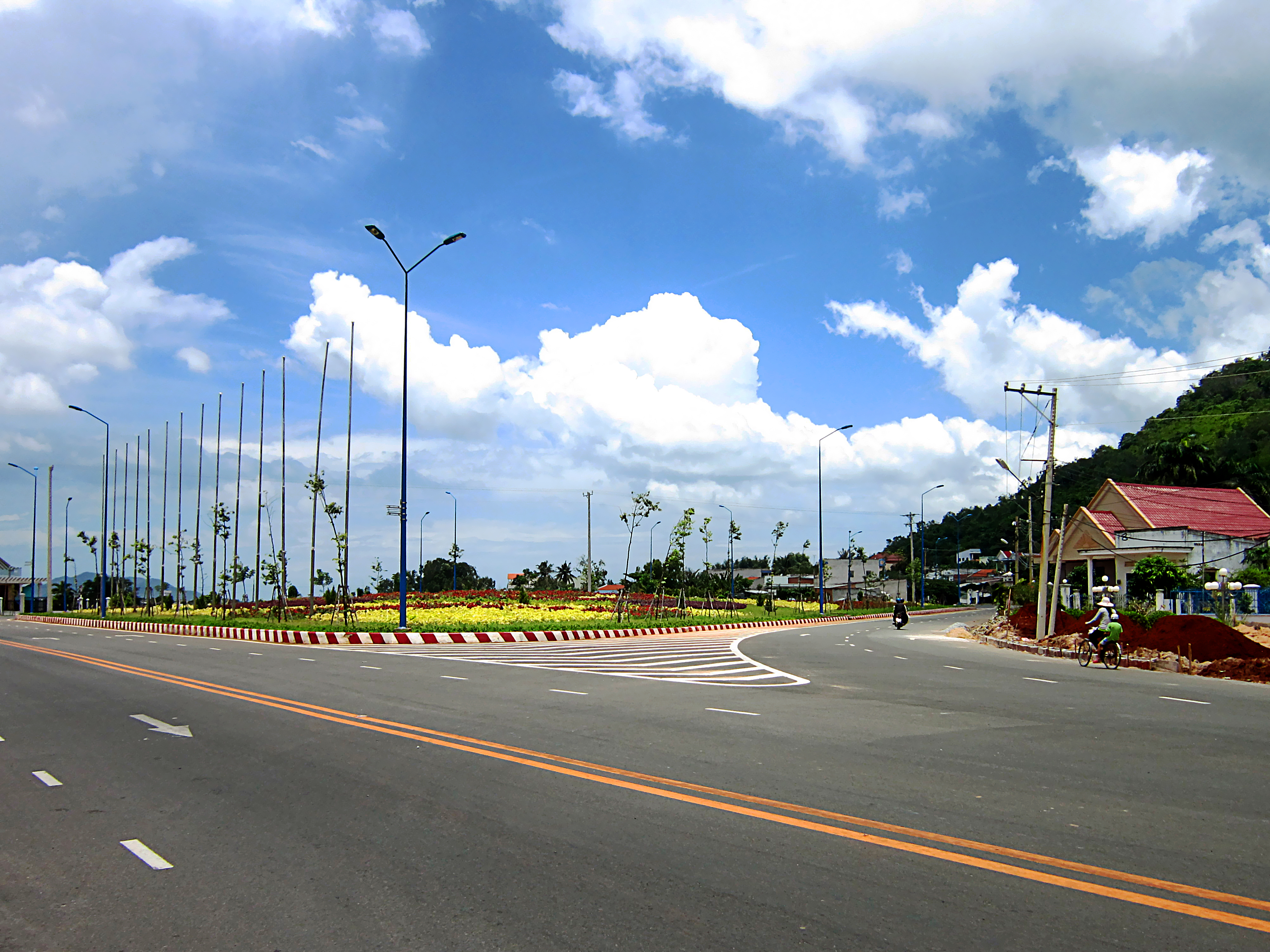 Tại vòng xoay trung tâm ở Long Sơn, thuộc thành phố Vũng Tàu, tỉnh Bà Rịa - Vũng Tàu, Việt Nam.